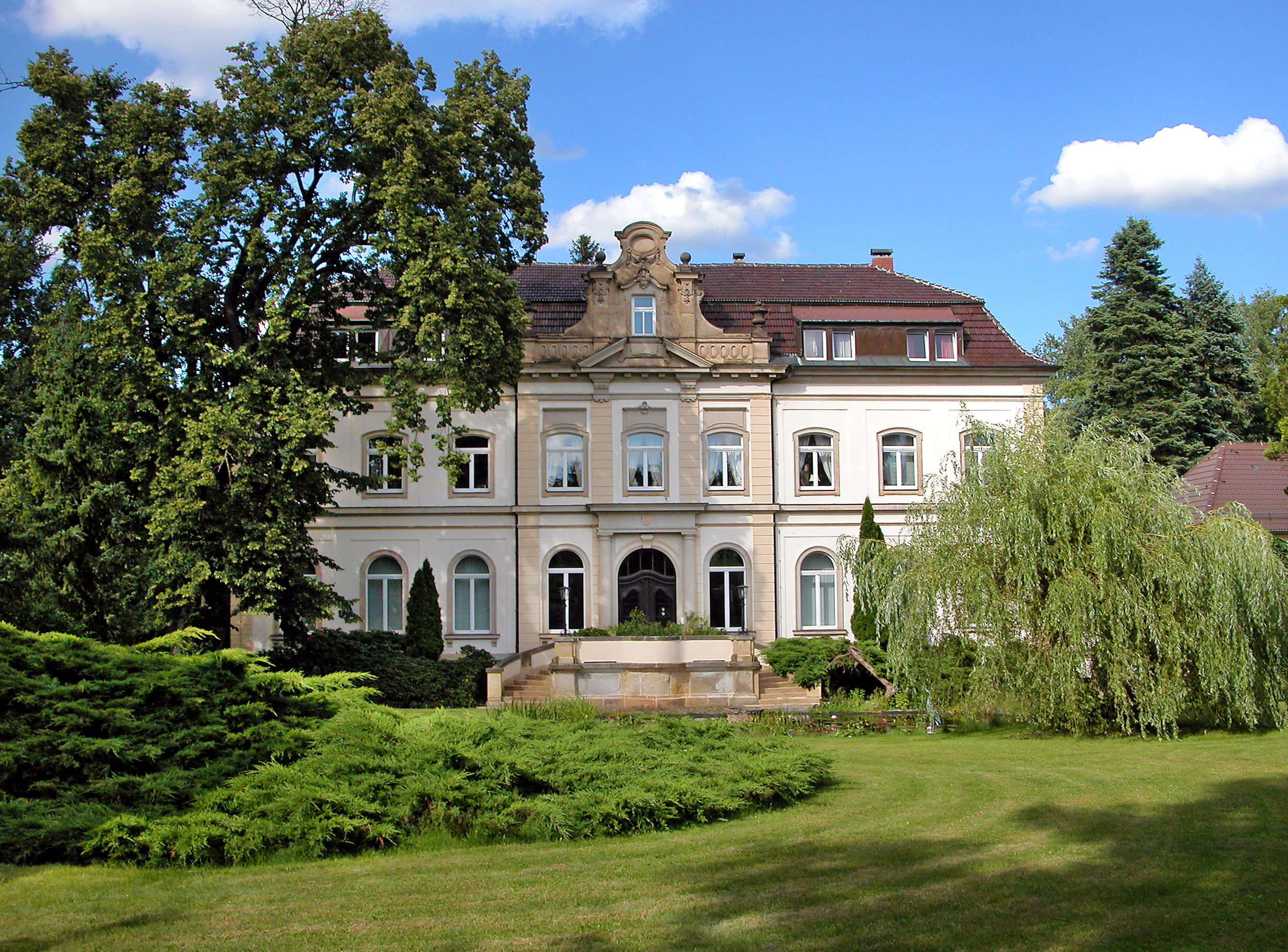 09.07.2012 01458 Medingen (Ottendorf-Okrilla), Dorfstraße (GMP: 51.183398,13.791387): Schloß Medingen, Südseite. Die Wurzeln des Ritterguts Medingen reichen bis ins 13. Jahrhundert zurück. Nachdem der Vorgängerbau, ein barockes Herrenhaus, 1894 abgebrannt war, erbaute ab 1895 Hofrat Paul Mehnert das heute vorhandene Gebäude. [DSCNn4335.TIF]20120709350DR.JPG(c)Blobelt